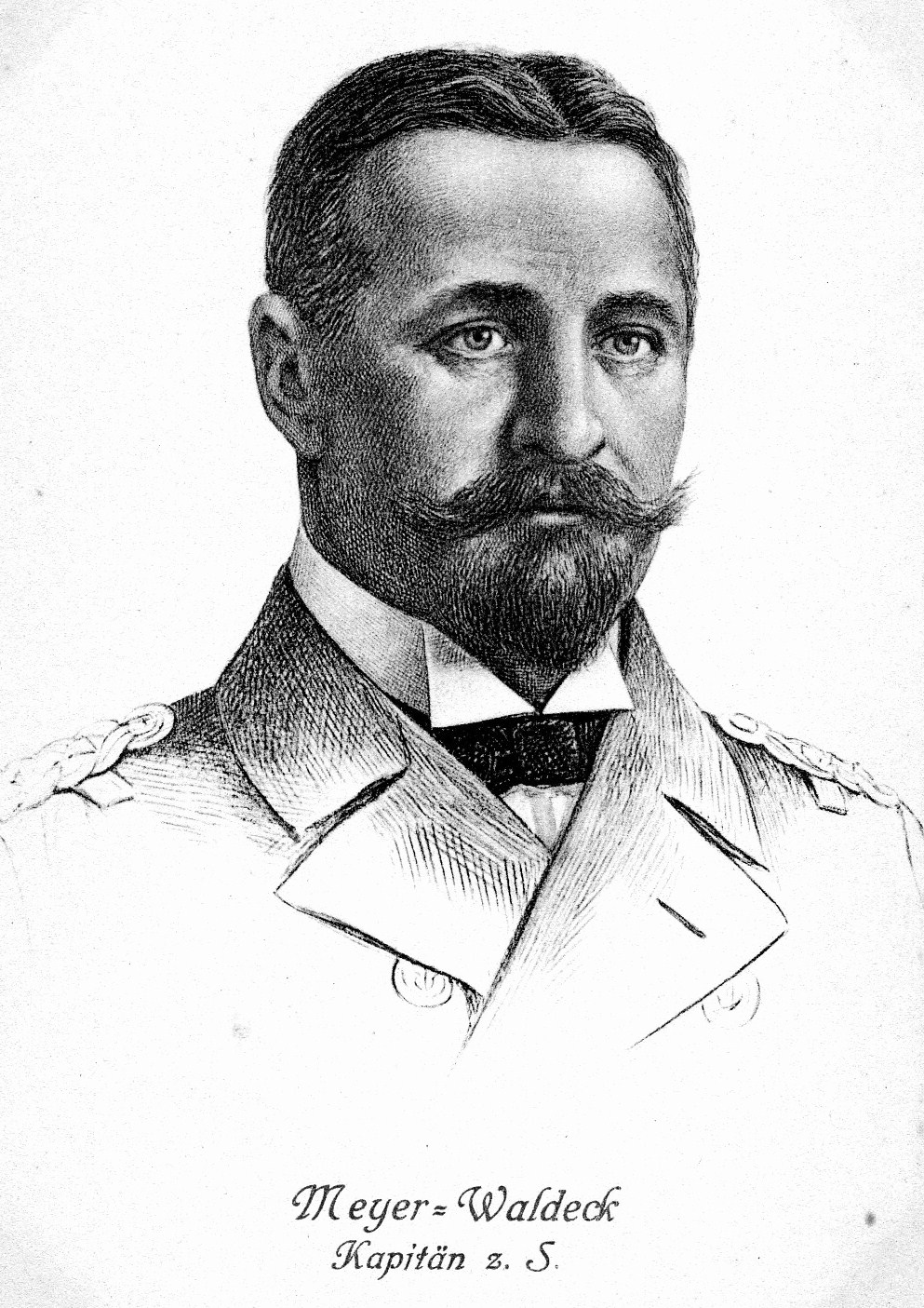 Alfred Meyer-Waldeck (1864-1928) als Kapitän z.See, zuletzt Vizeadmiral; er war der letze Gouverneur von Kiautschou.